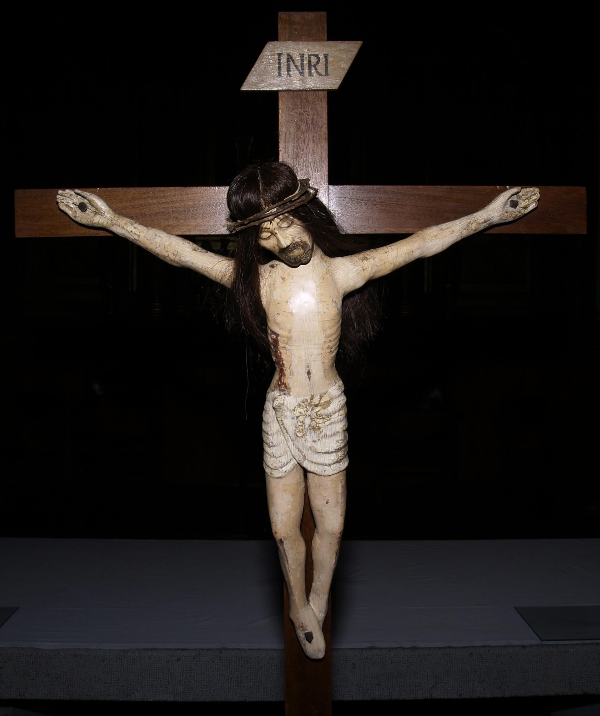 Es una talla que podría catalogarse en el siglo XII